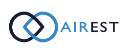 AS Airest-i logo